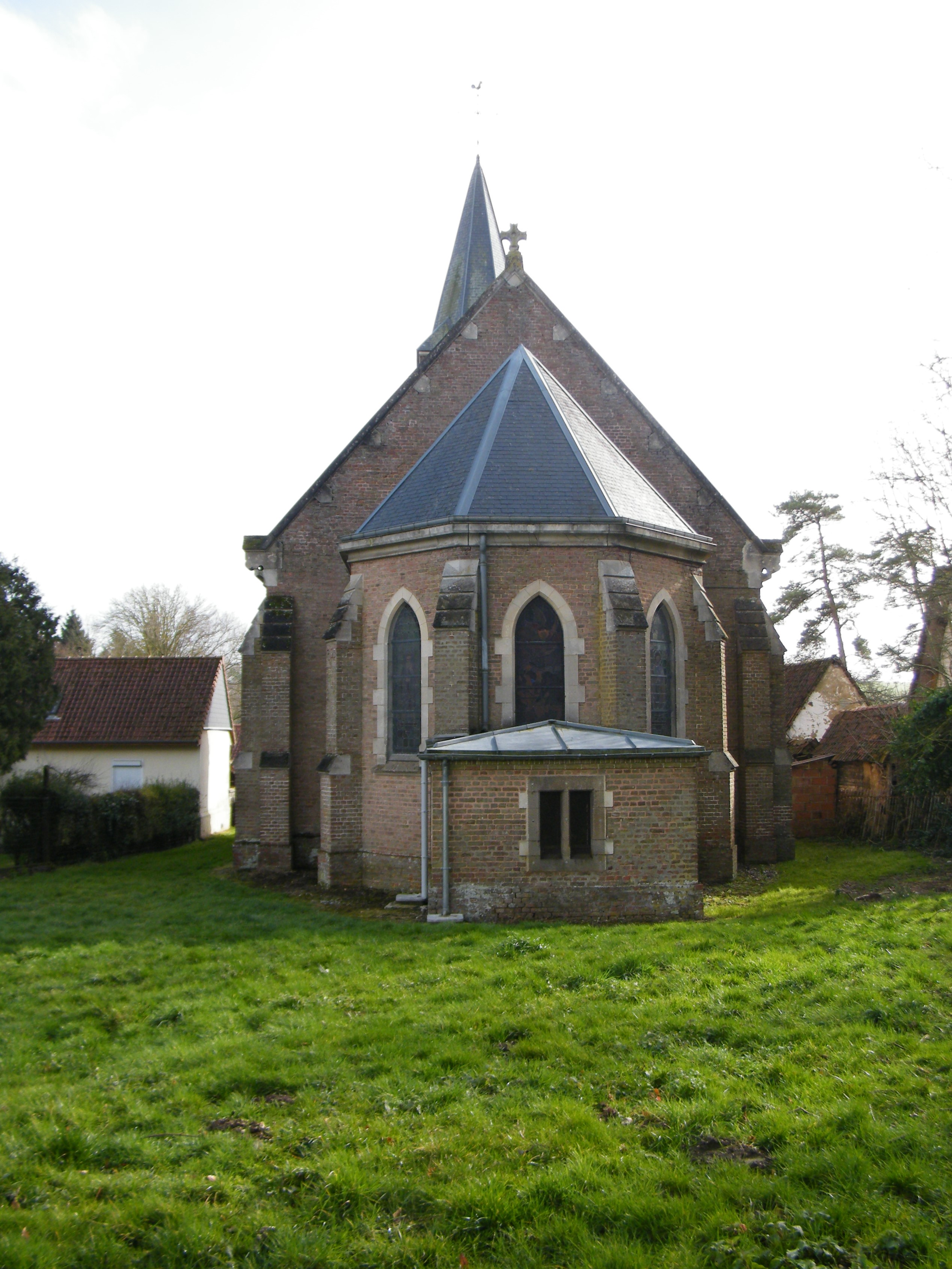 Bussus-Bussuel, Somme, France, le chevet de l'église Saint-Michel.